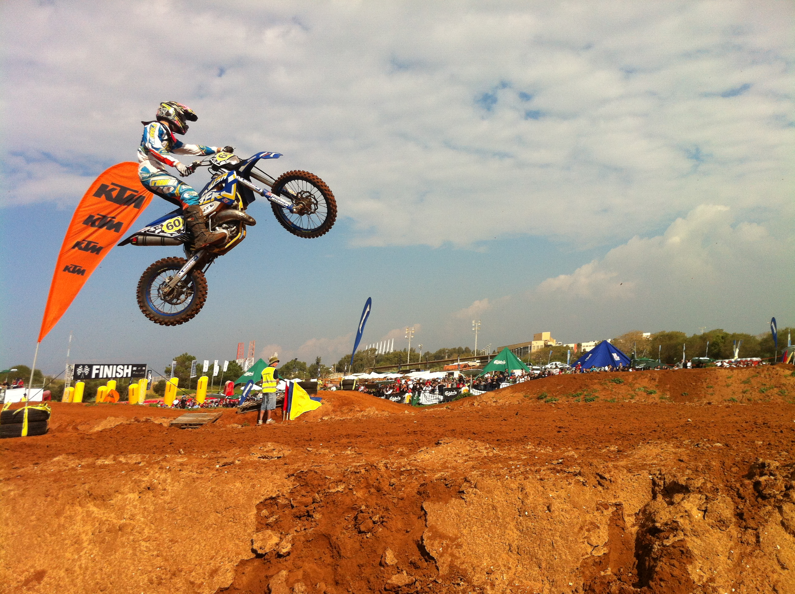 מירוץ מוטוקרוס